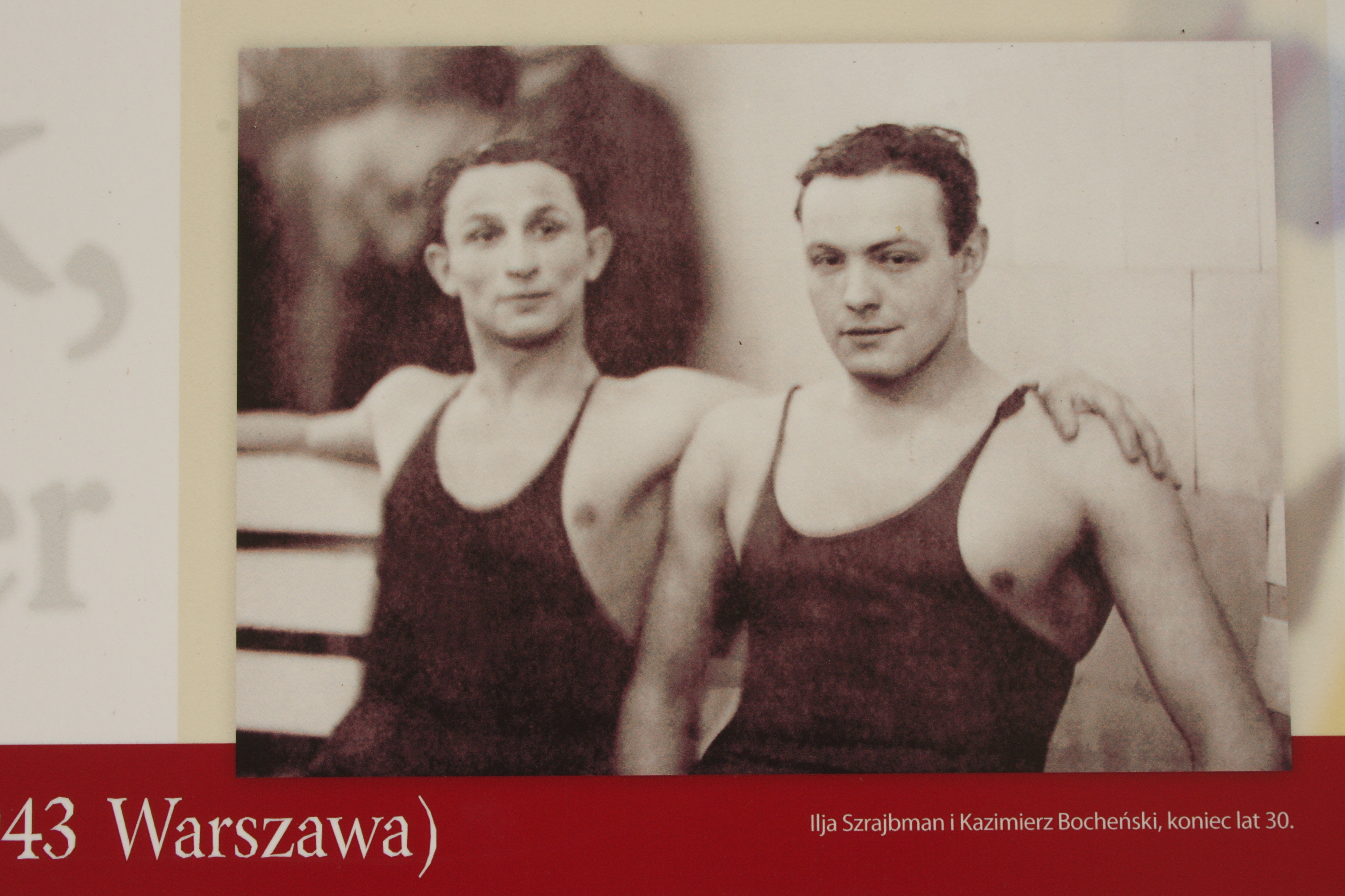 Fragment wystawy plenerowej ”Sport Żydowski w przedwojennej Warszawie” autorstwa dr Jarosława Rokickiego, przygotowanej przez Fundacje im. prof. Mojżesza Schorra, a prezentowanej na przełomie 2012/2013 r., przy ul. Twardej 6 w Warszawie. Na fotografii fragment tablicy pt. "Olimpijczyk, pływak i bohater - Ilija Szrajbman (ur. 1905 Warszawa - zm. styczeń 1943 Warszawa). Fragment z reprodukcją zdjęcia Ilji Szrajbmana z Kazimierzem Bocheńskim